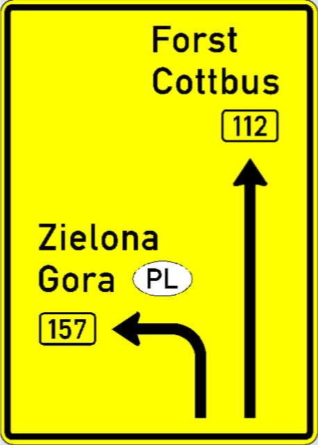 Wegweiser aus den Planungsunterlagen der Straßenverkehrsbehörde